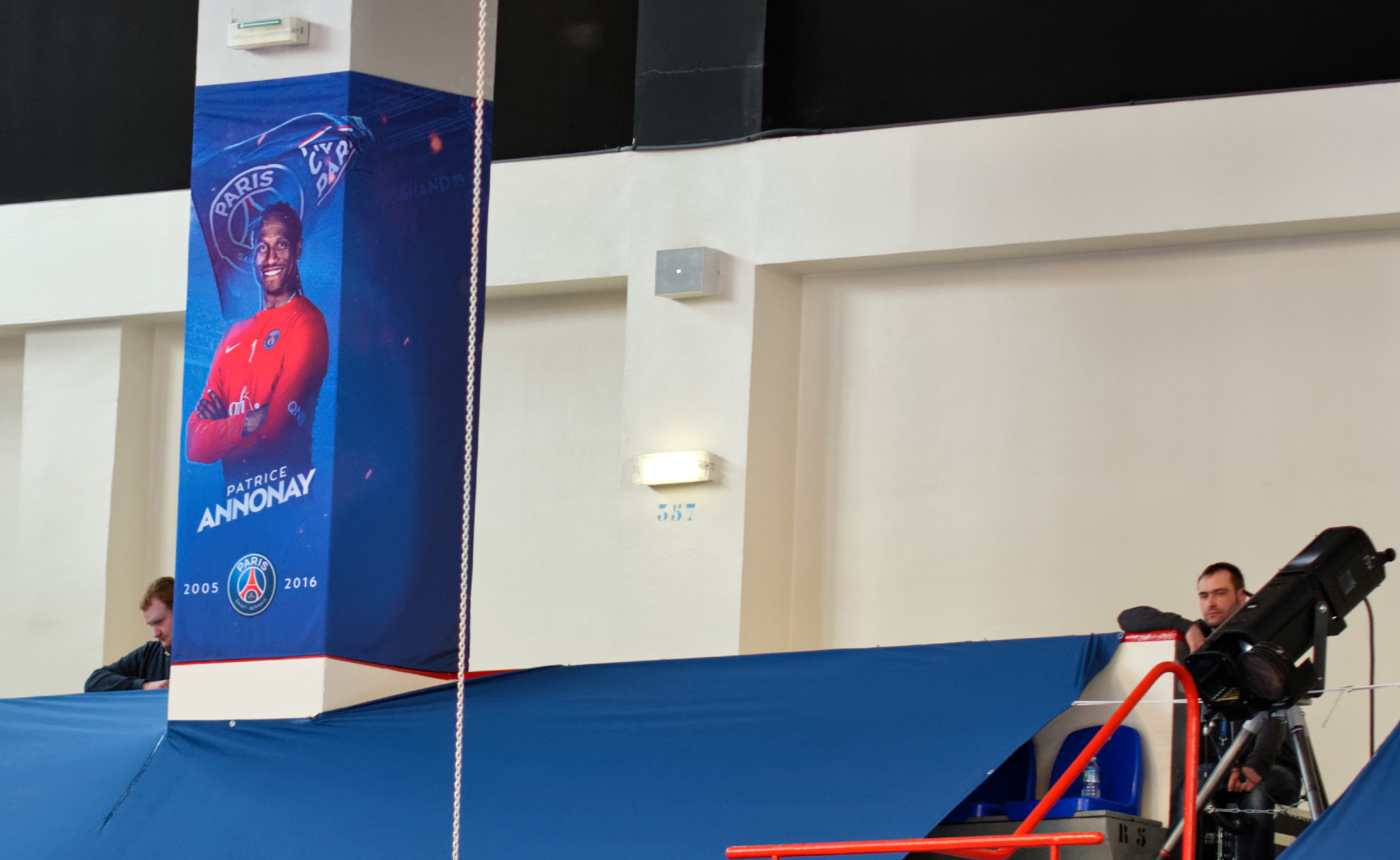 Hommage à Patrice Annonay (le gardien emblématique du club parisien) sur l'une des colonnes surplombant le terrain de Coubertin. Affiche visible toute la saison depuis son départ.. A Coubertin, le 1er avril 2017.